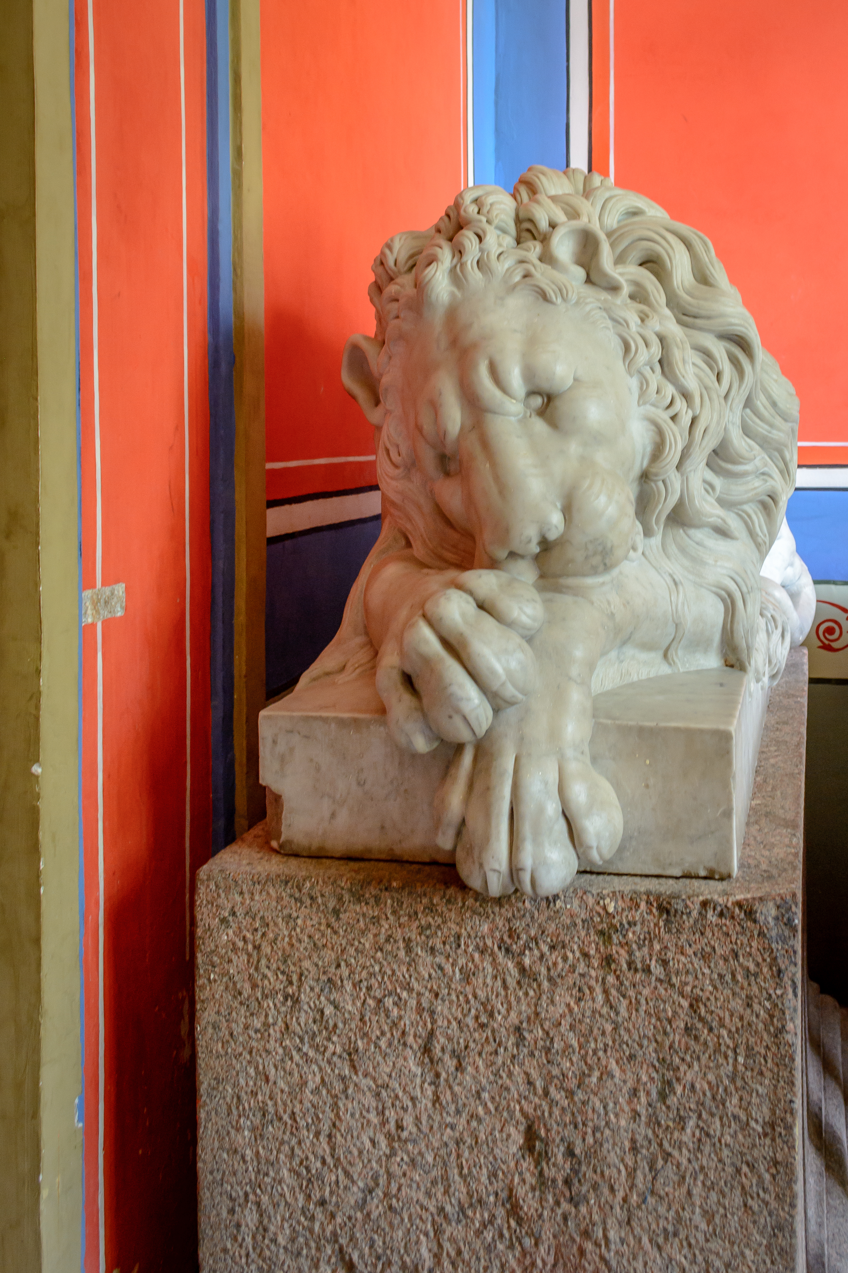 Skulptuur "Lamav lõvi", 18/19.saj. (marmor)